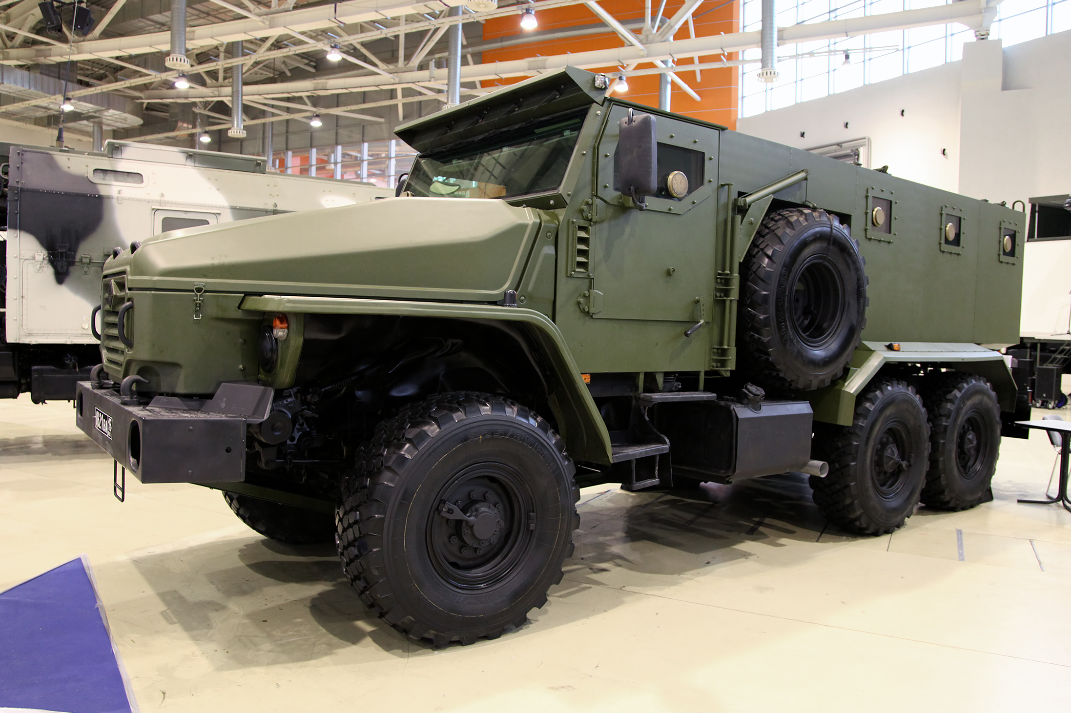 Бронеавтомобиль Урал-ВВ (Ural-VV armored vehicle)